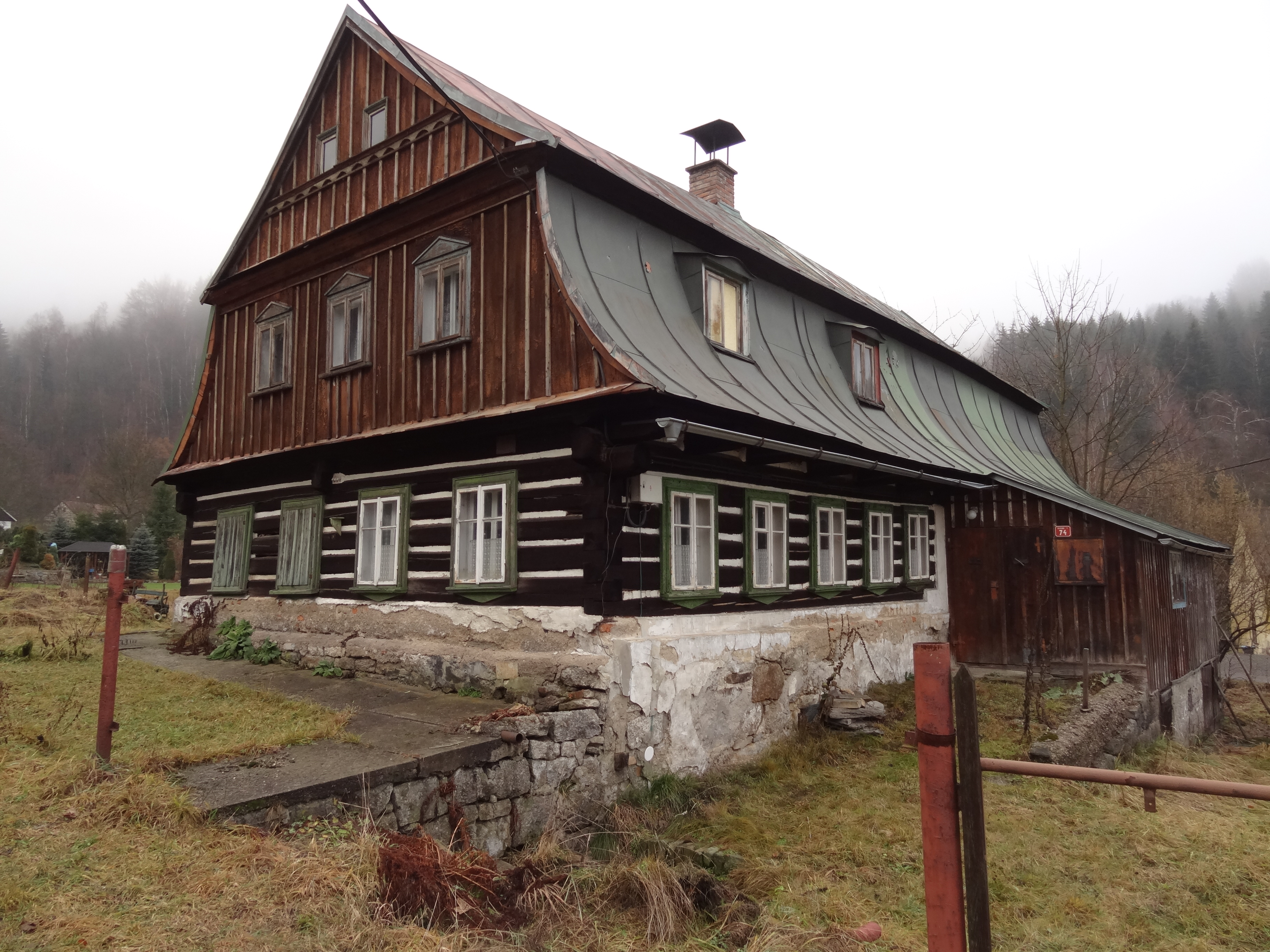 Dům če. 74, Údolní če. 74, Desná I, Desná.